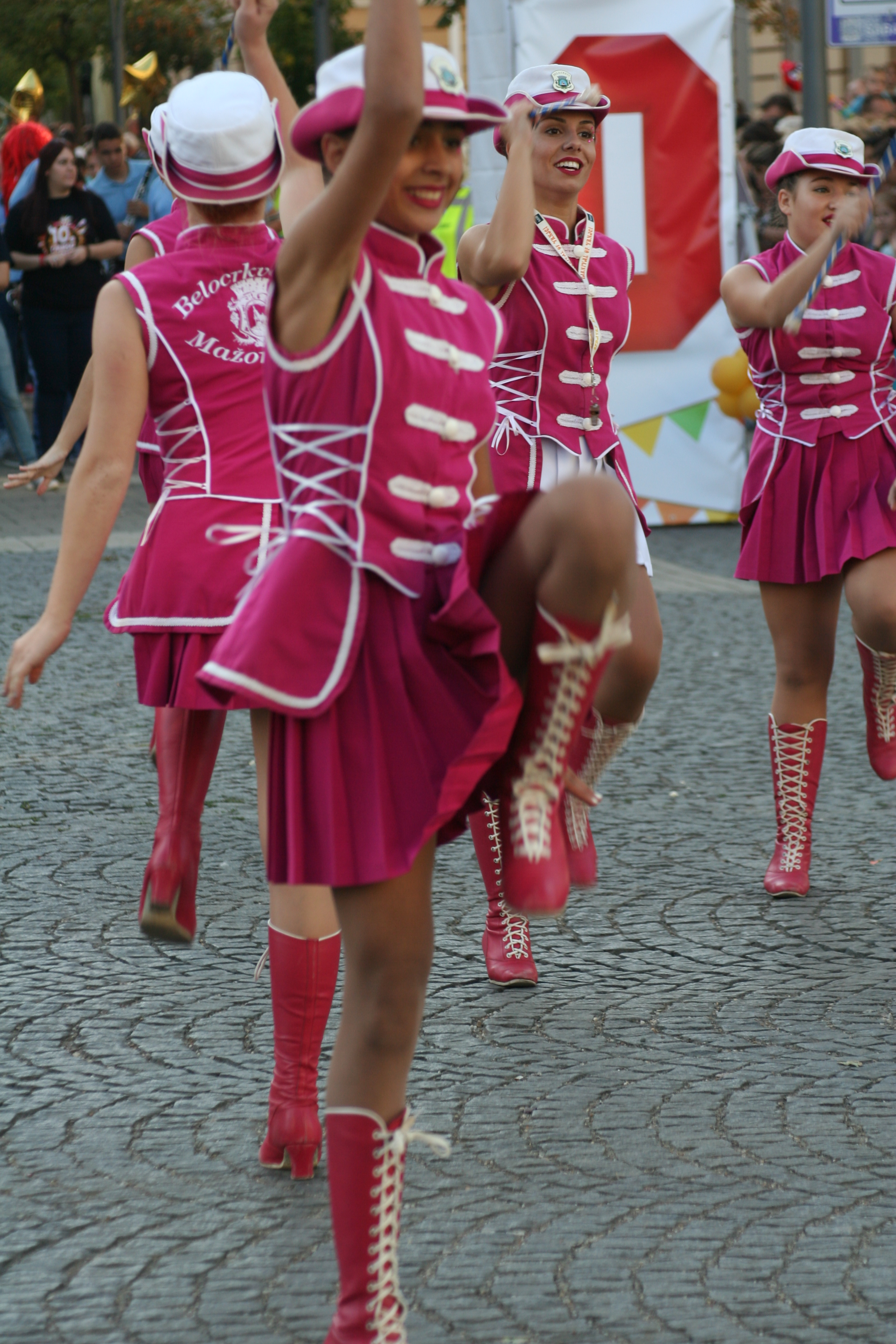 Šabac, Čivijada i dečiji karneval